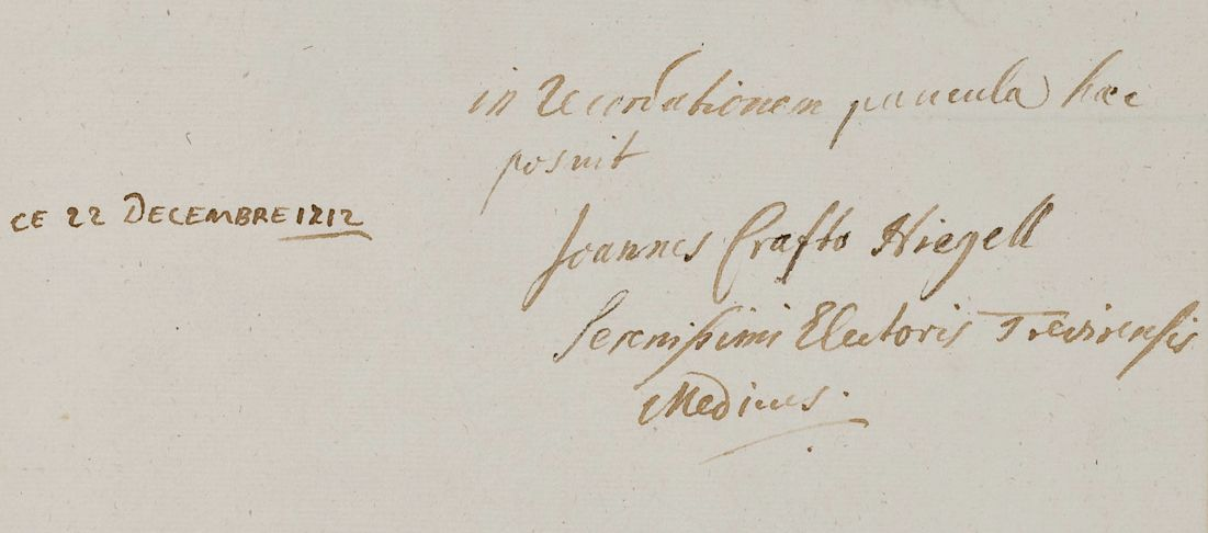 eigenhändiger "Bijdrage van Joannes Crafto Hiegell (1658–1736), medicus en archeoloog, in het bezoekersboek c.q. album amicorum van Nicolaas Chevalier (1661-1720), boekhandelaar uit Sédan"